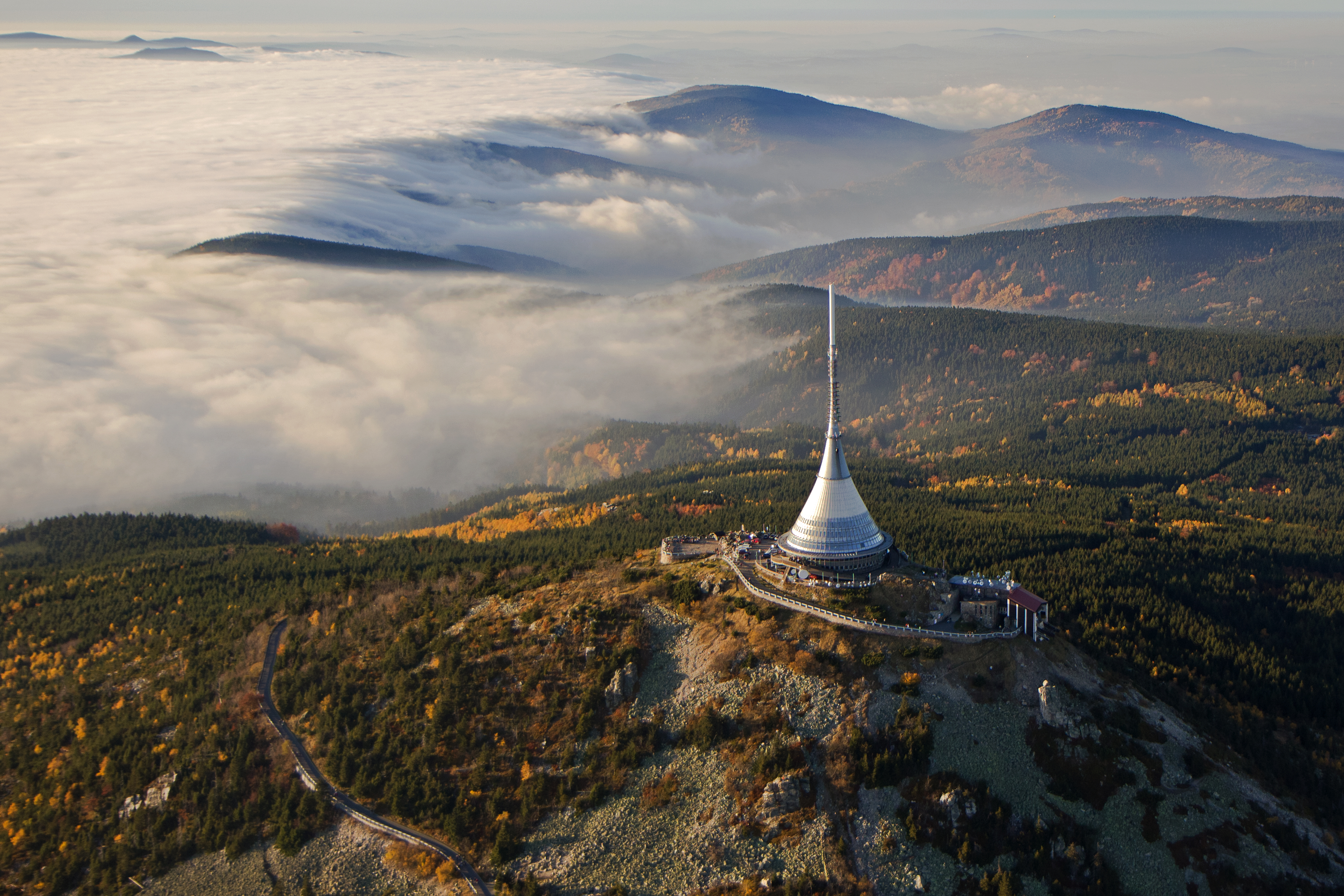 Hotel horský Ještěd (Liberec), vrchol hory Ještěd 153, Liberec